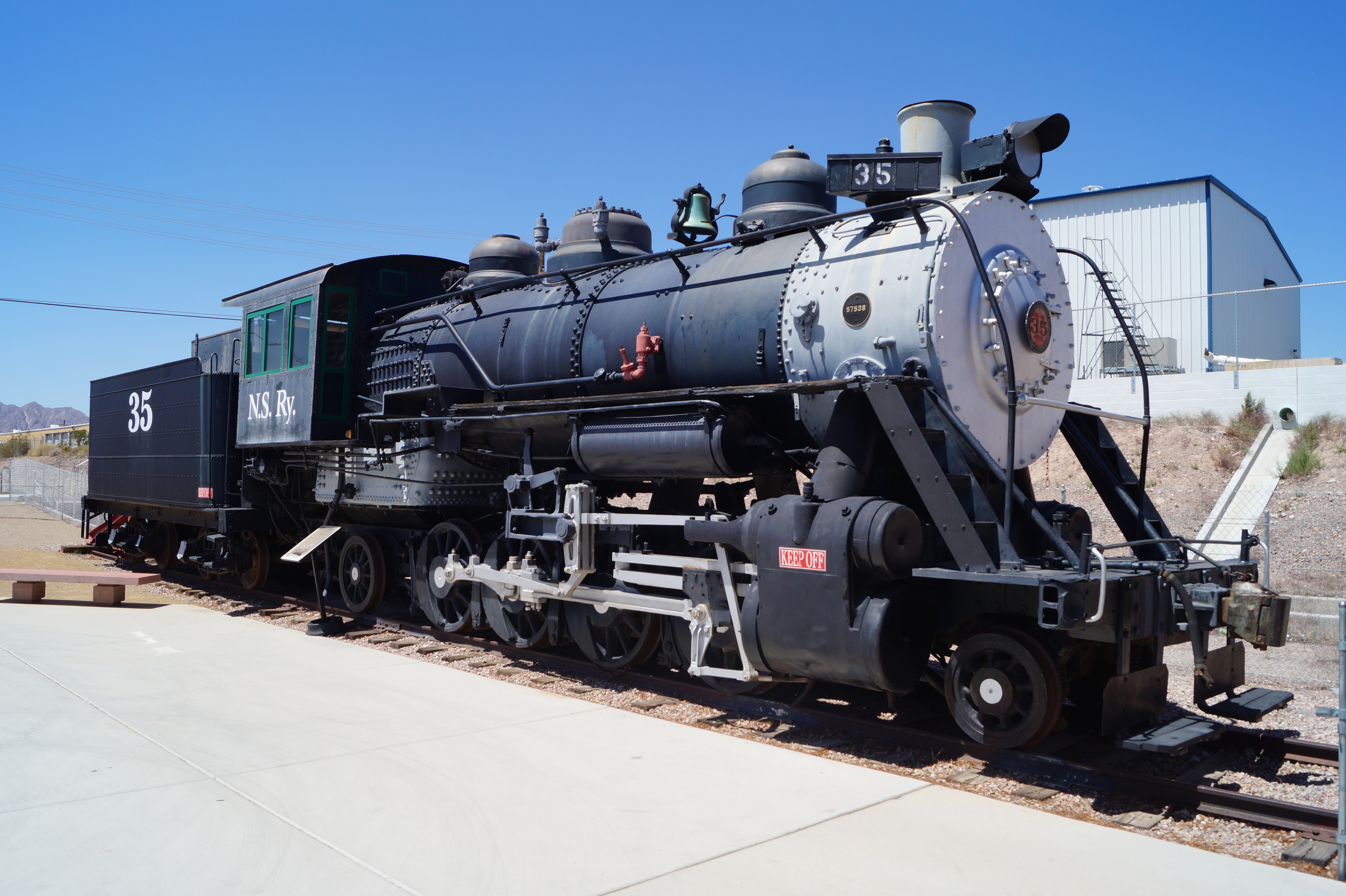 The Nevada State Railroad Museum which is an agency of the Nevada Department of Cultural Affairs. It is located at Yucca Street on the tracks of the historic Union Pacific Railroad branch Henderson-Boulder City near the former Boulder City Railroad Yards where the Hoover Dam construction equipment was unloaded in the 1930s.